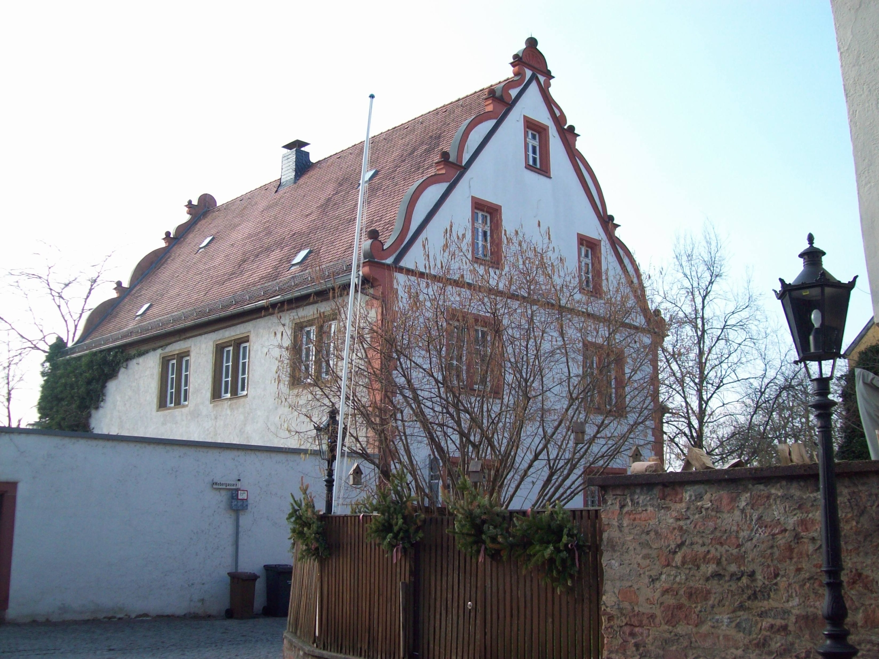 Kurfürstliche Schneiderei Aschaffenburg erbaut um 1600